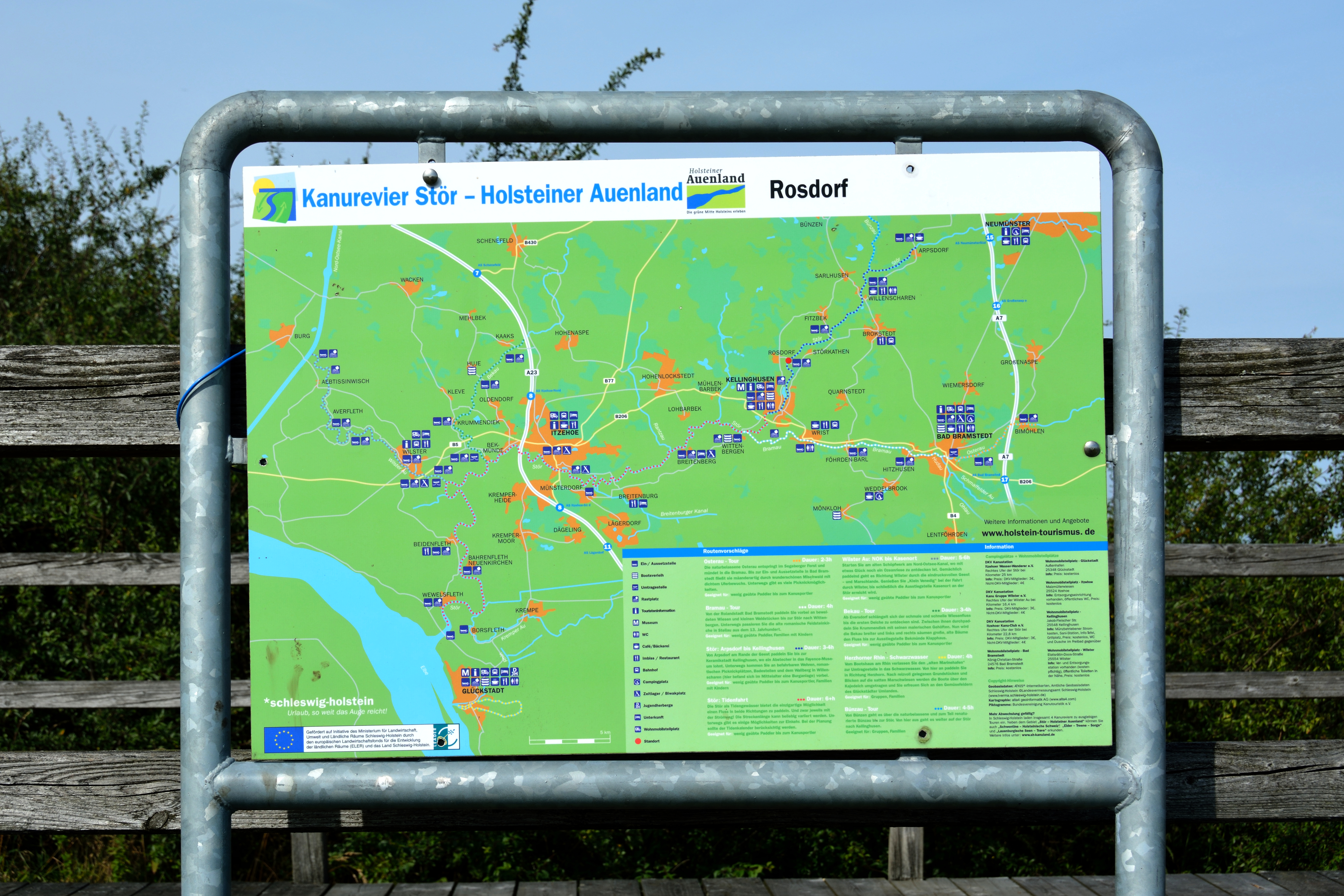 Impressionen der Störbrücke in Rosdorf